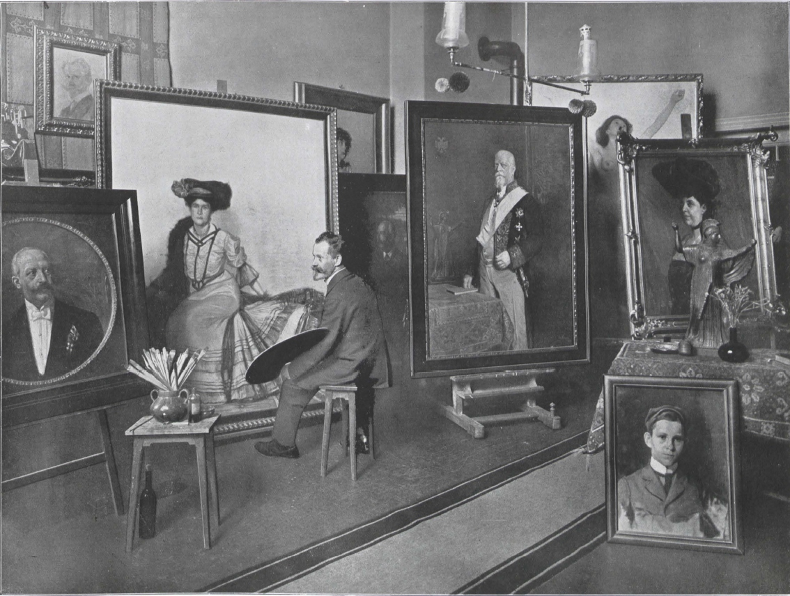 Willy Werner (1868-1931), deutscher Porträt- und Genremaler.